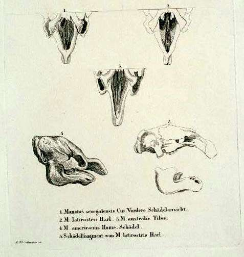 Sirenia Skull-Fragments, Manatus senegalesis Cuv, Manatus latirostris Harl; Manatus australis Tiles